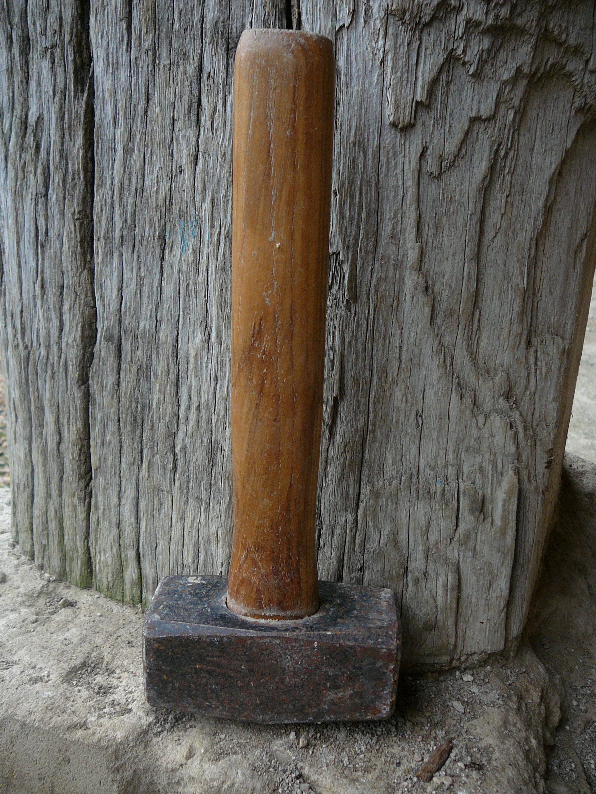 Une massette, outils de percussion directe ou indirecte